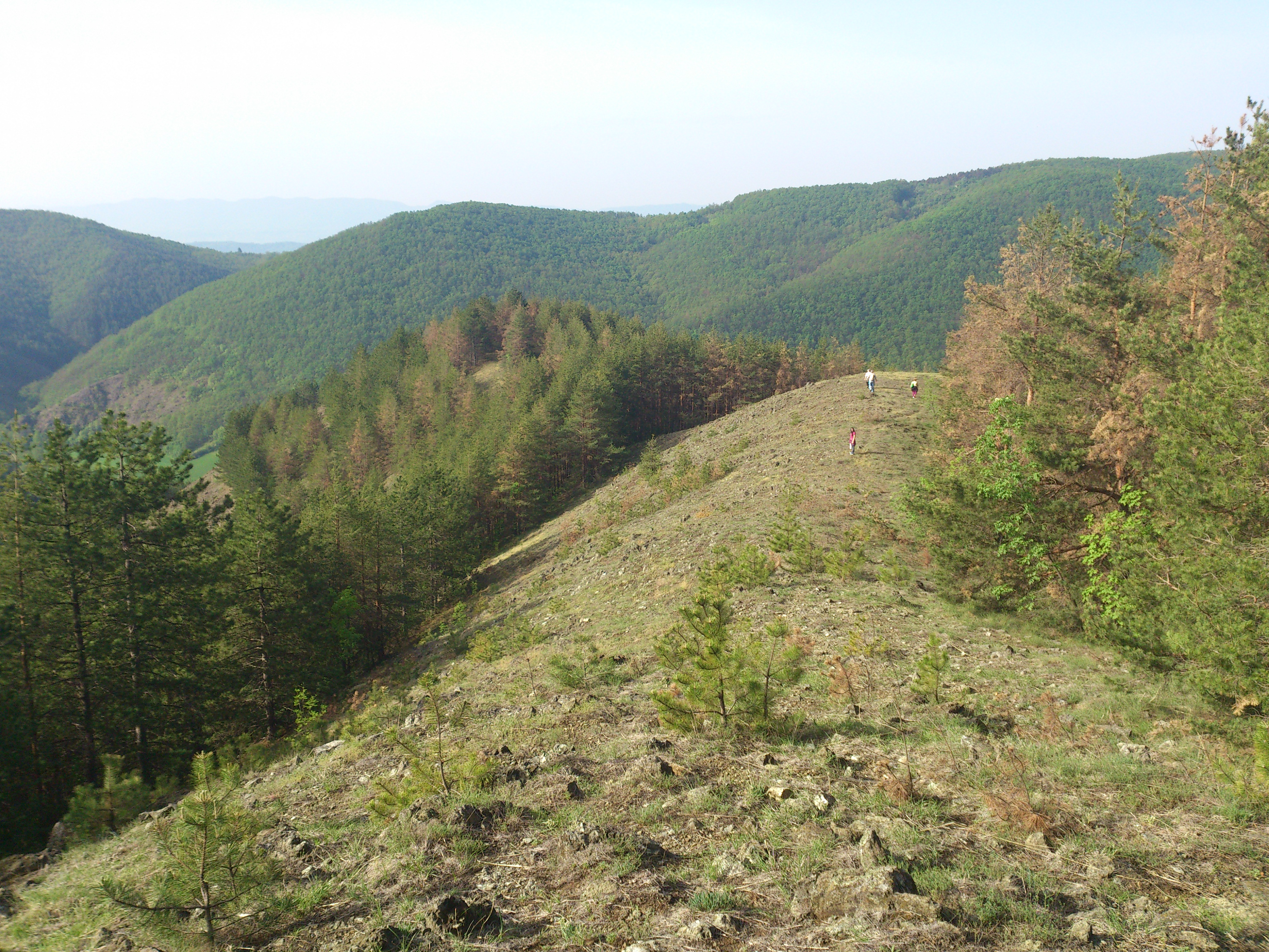 Крвавац (555 m) је велико шумовито и разгранато брдо на јужној страни села Шарани, са узаном висоравни на врху брда. Сверозападна страна спушта се ка унутрашњем делу села, источна страна припада селу Семедраж, а јужна и југозападна страна спуштају се до леве обале реке Дичине.